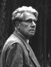 Johannes Hendrikus Becking, August 1956